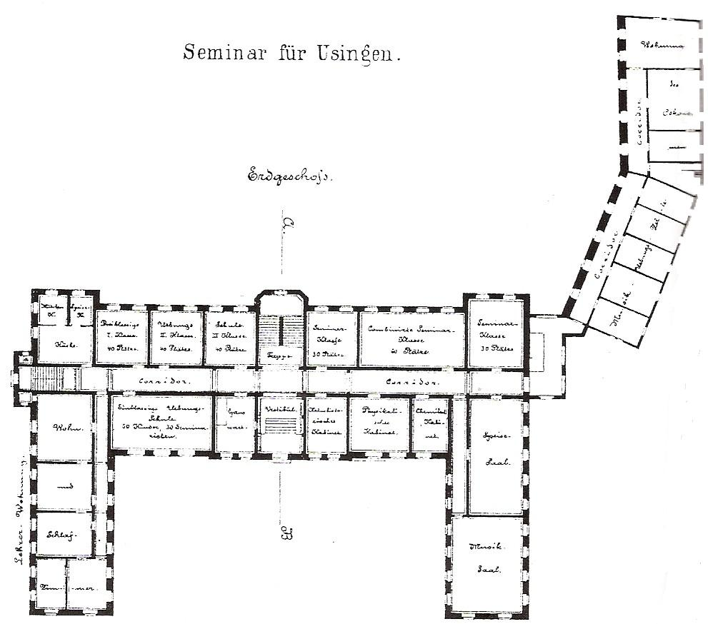 Pläne des Neubaus des Lehrerseminars in Usingen (Schloss; heute Christian-Wirth-Schule)